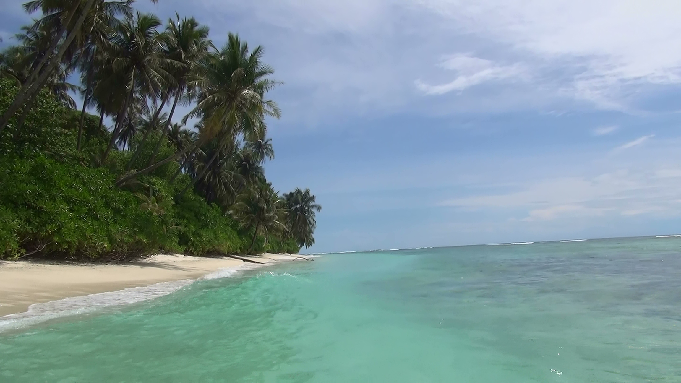 Ile Web Robinson